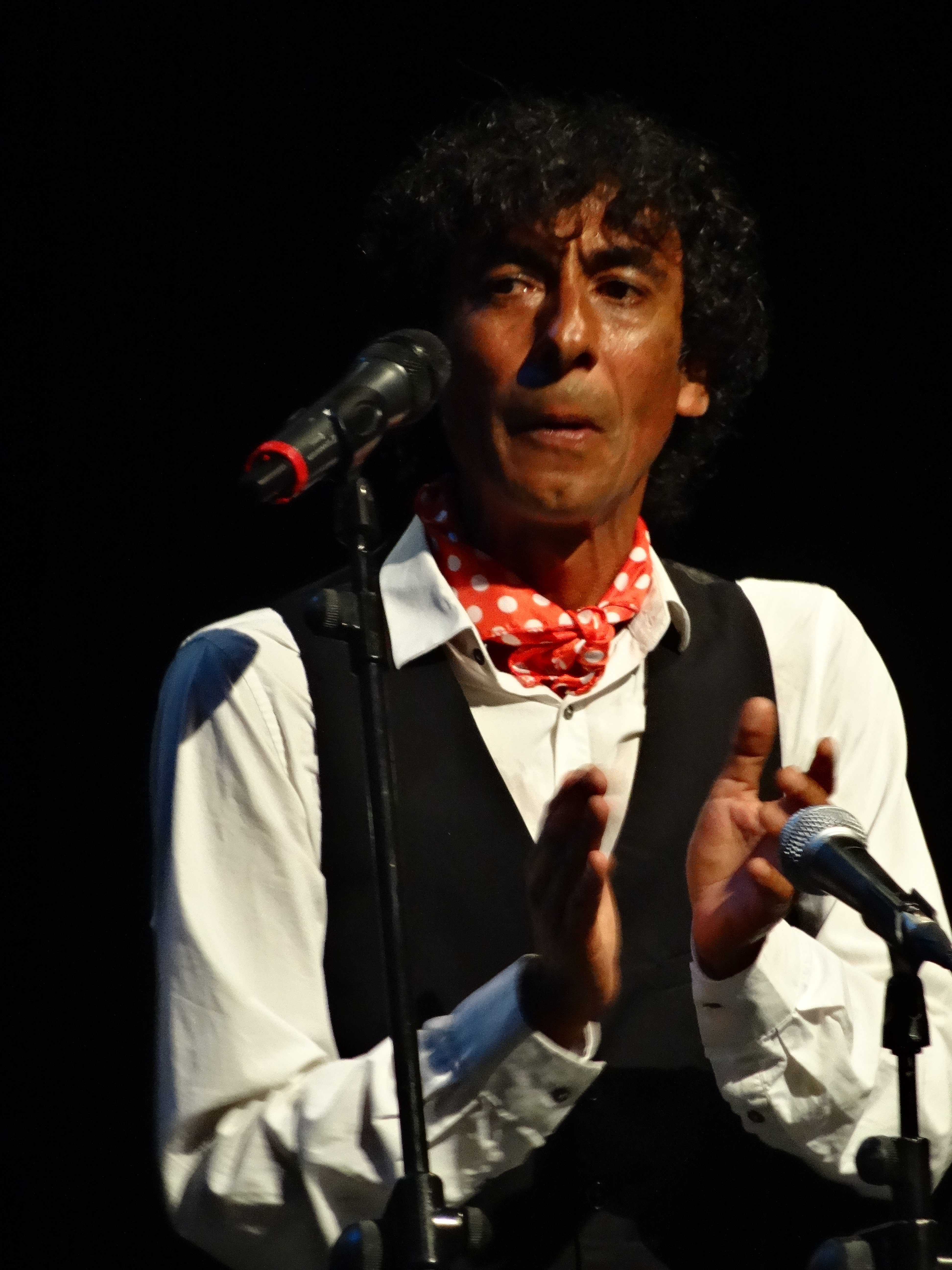 Concierto especial de Jorge Pardo para el XX aniversario del Festival de Jazz de San Javier. FORMACIÓN: Jorge Pardo (saxos y flautas) Niño Josele (guitarra flamenca) Tomasito (bailaor, compás y voz) Albert Sanz (piano) Pablo Báez (contrabajo) Ané Carrasco (percusión) Juan Grande (compás)